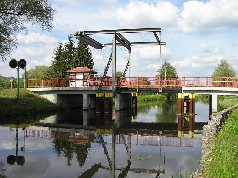 bascule bridge in Niederfinow over the Finowkanal